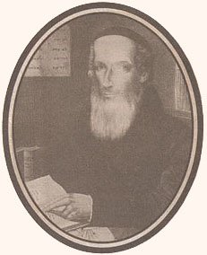 רבי אברהם ריס